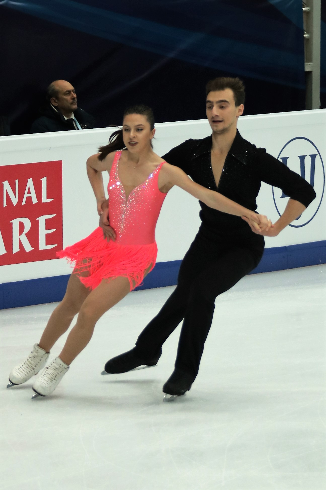 Дарья Попова и Владимир Беликов (Украина) на Чемпионате Европы по фигурному катанию 2018.